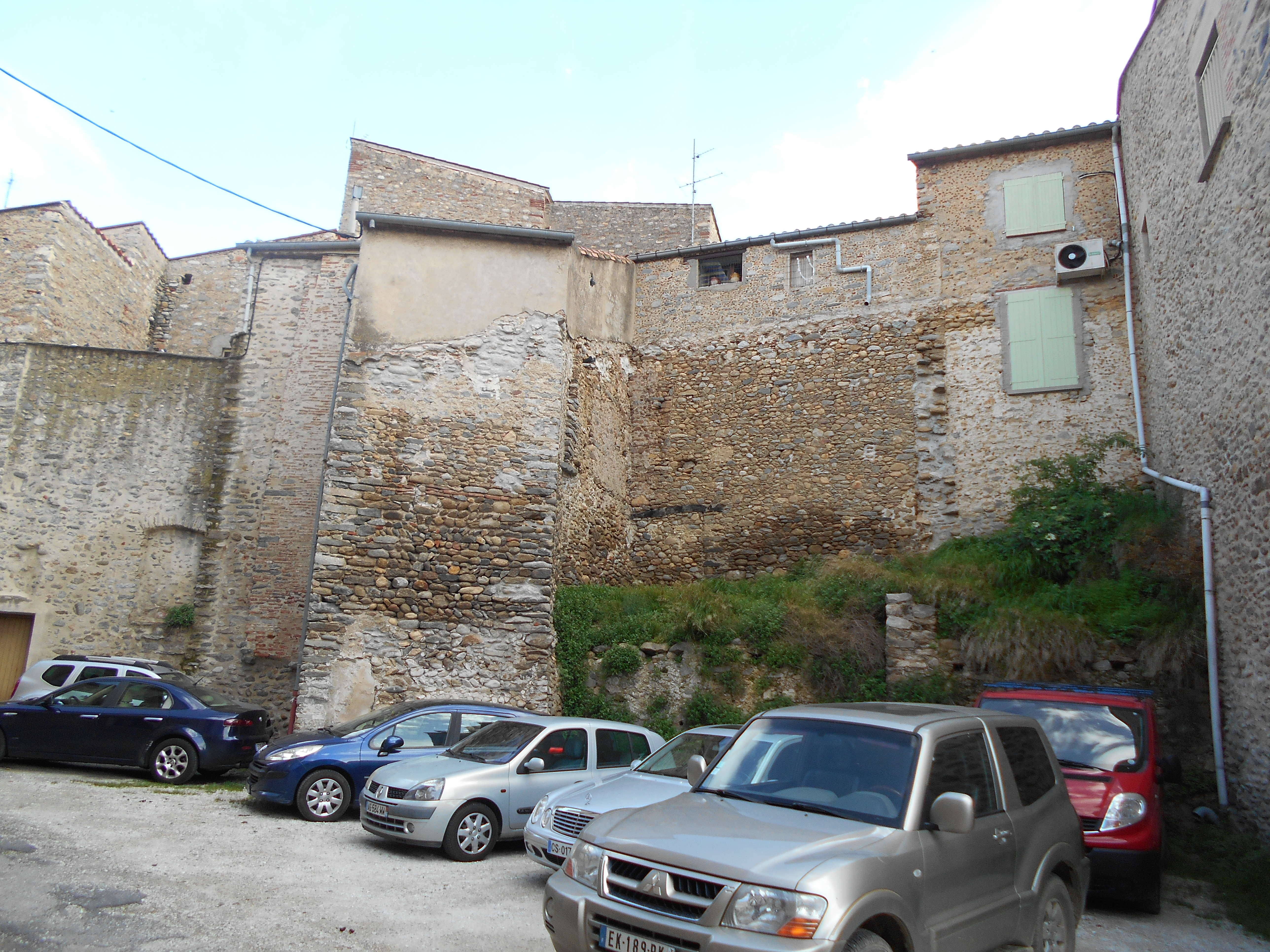 Muralles de la Vila Nova de Vinçà